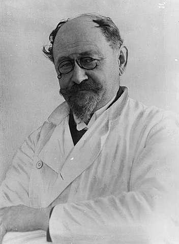 Norwegian mycologist Olav Johan Sopp.